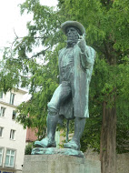 פסל סוחר הפשתן המוצב במרכז העיר בילפלד, כהוקרה להיסטוריה של העיר